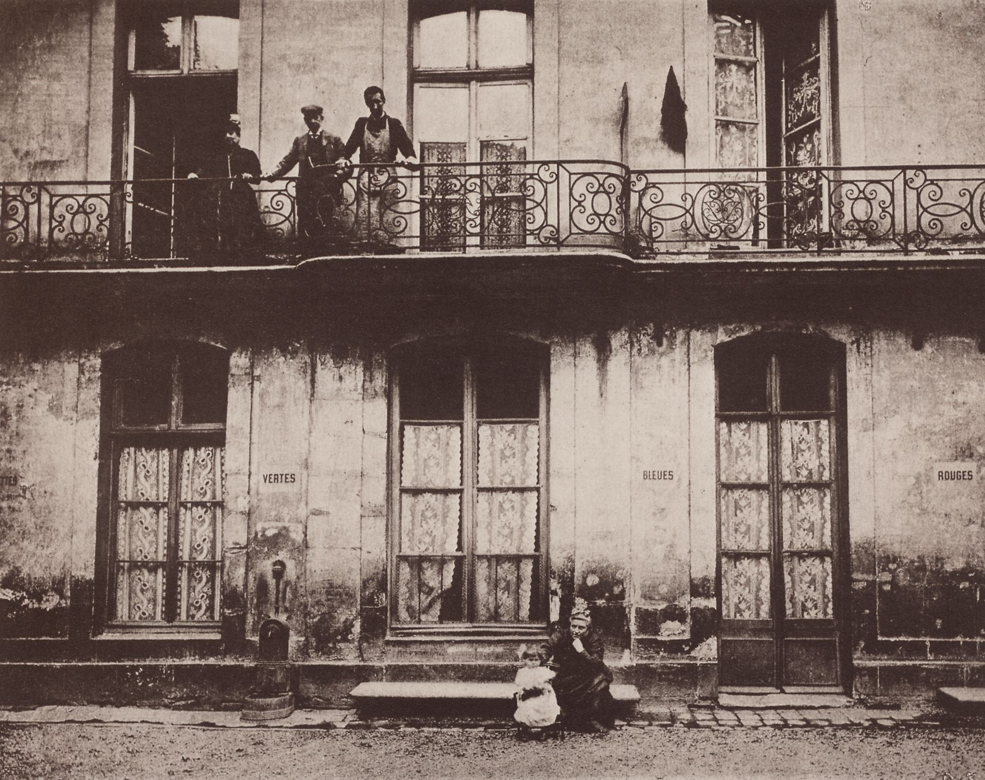 Atget, Eugène: Alte Häuser, alte Straßen, pittoreske Ansichten, Rue Saint-Sauveur